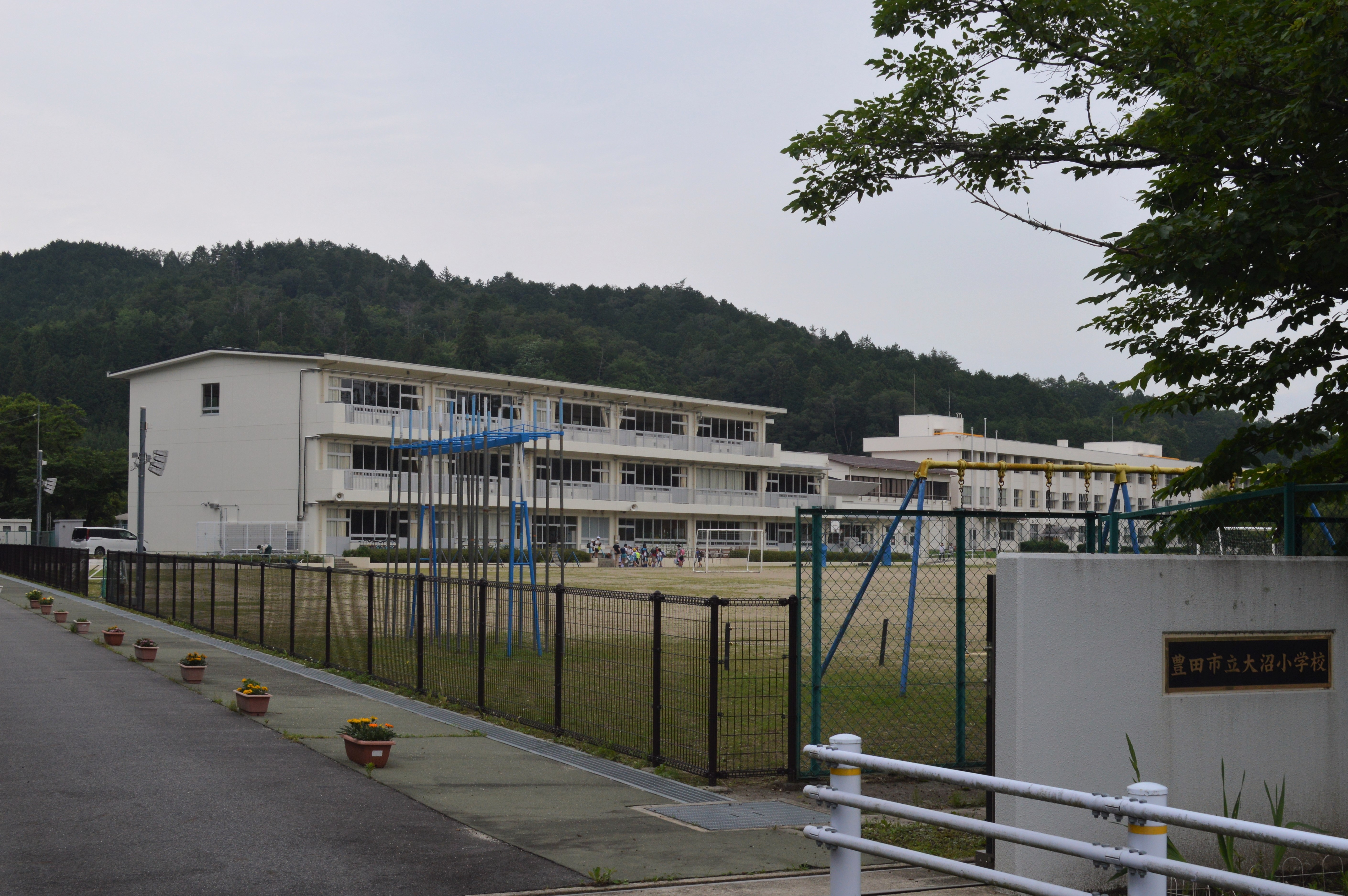 愛知県豊田市大沼町にある豊田市立大沼小学校。